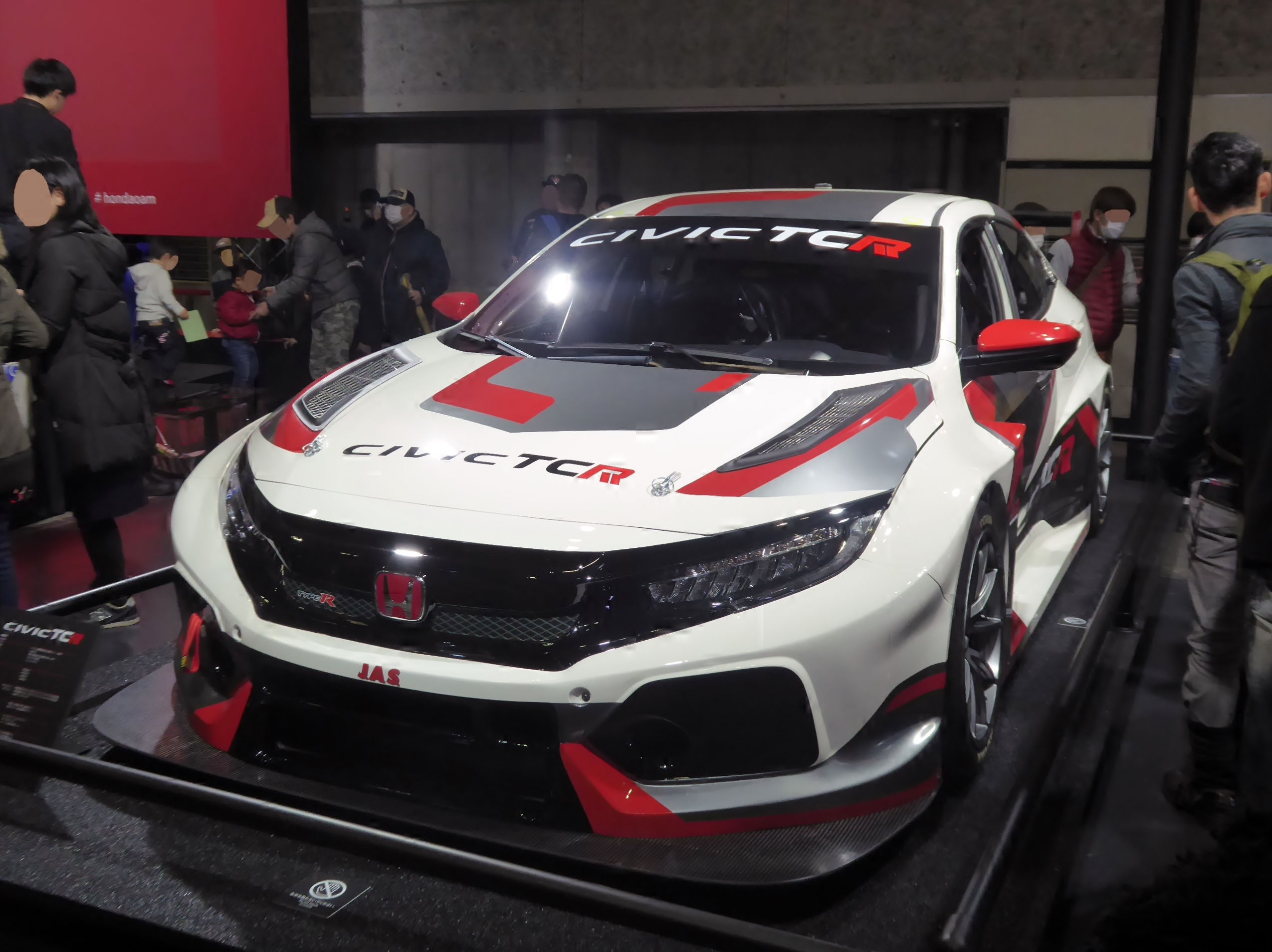 大阪オートメッセ2018に於いてホンダ・シビックTCRを撮影。